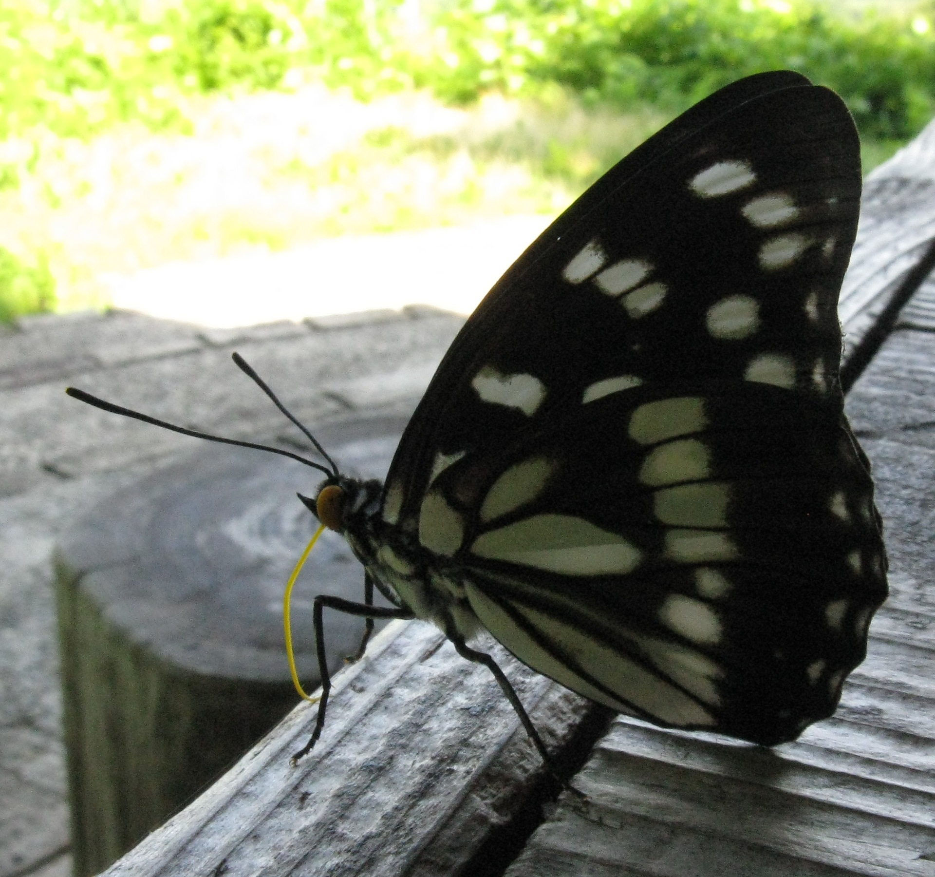 Scientific name Hestina persimilis japonica